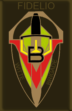 Ecusson de la Witte Brigade-Fidelio